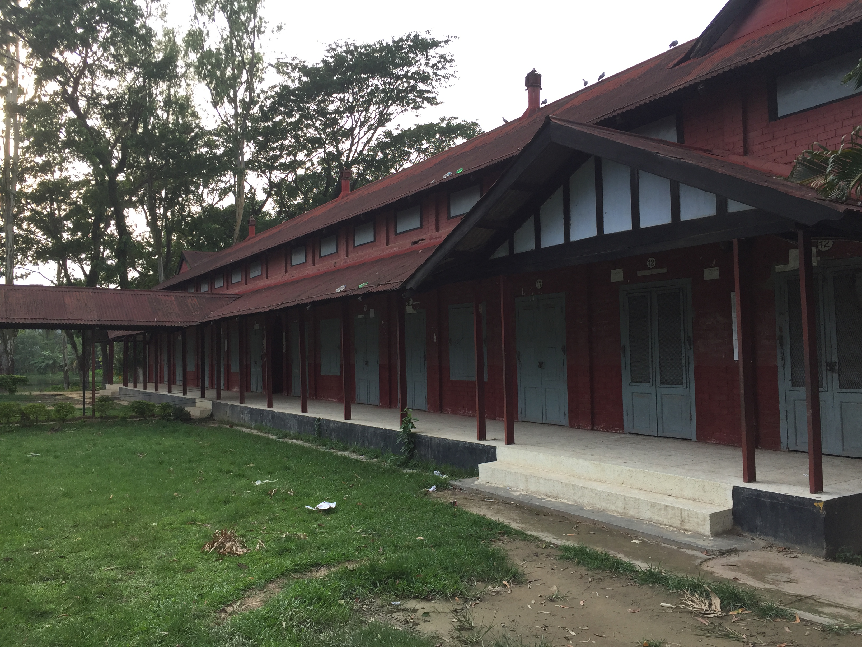 বিদ্যালয়ের একাডেমিক ভবনের একাংশ